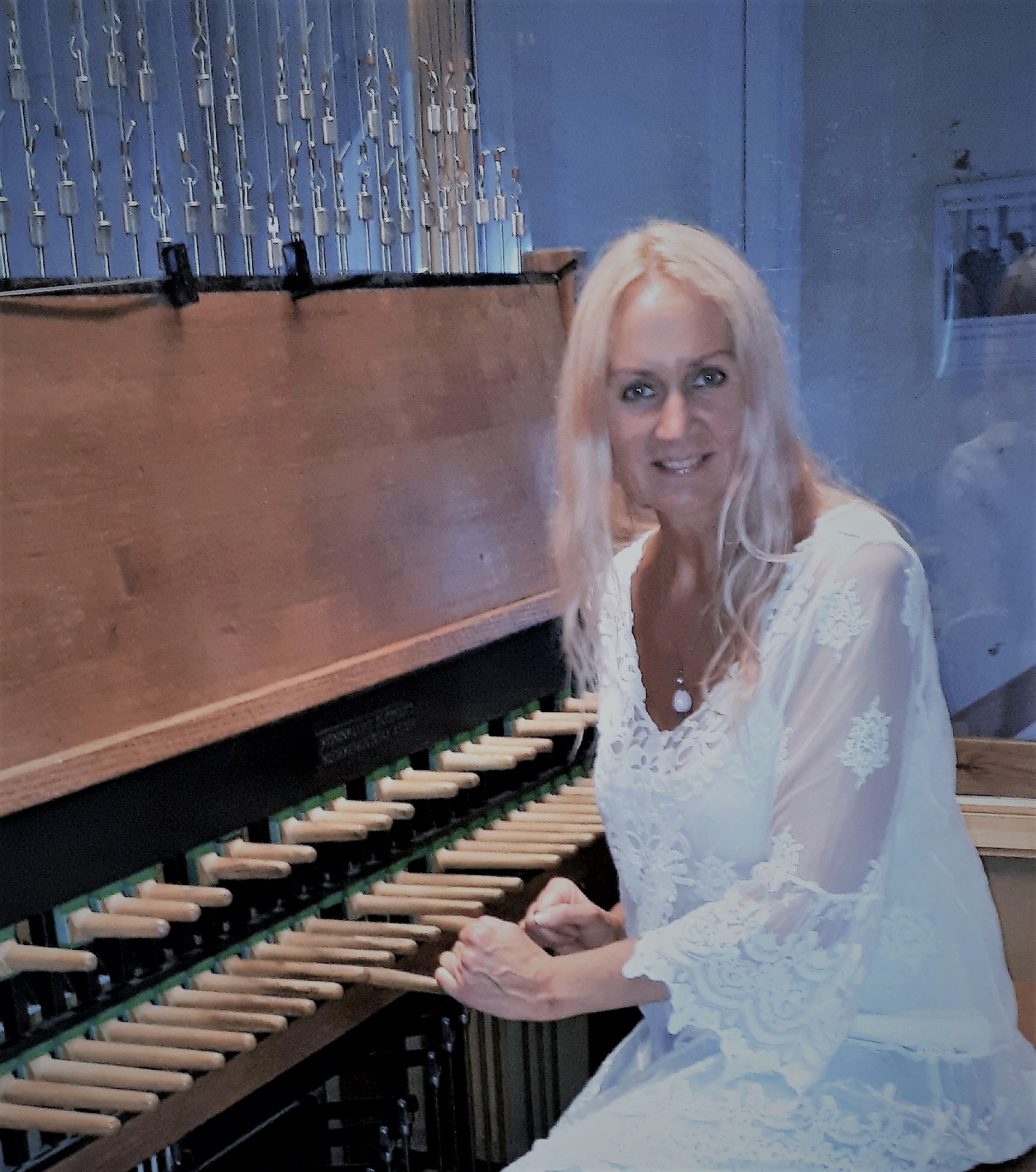 Merle Kollom kuninganna Ingridi karljonil. Püha Gertrudi kirik, Grenaa,Taani 2019